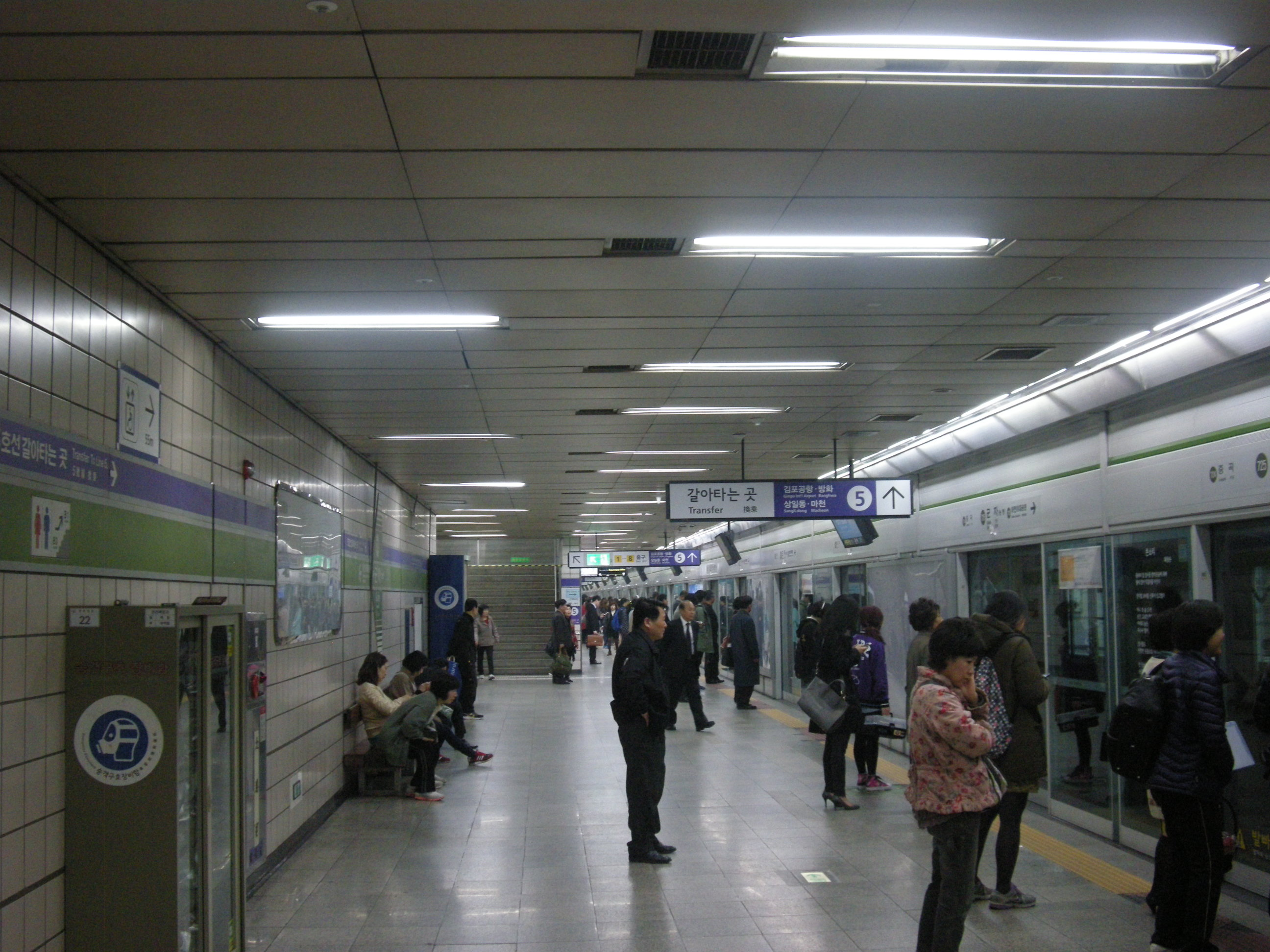 서울 지하철 7호선 군자역 부평구청 방면 승강장